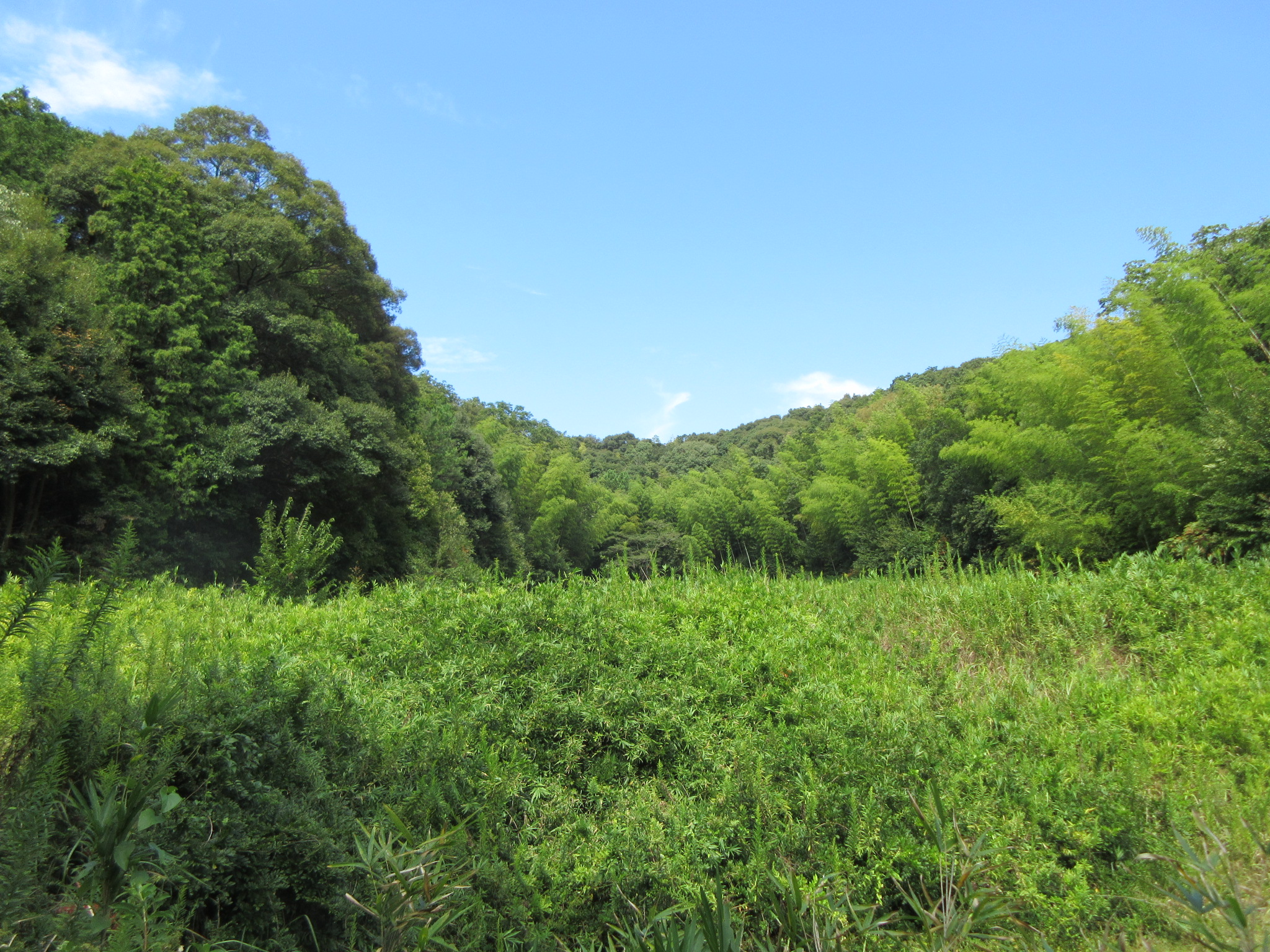 岡崎市東阿知和町